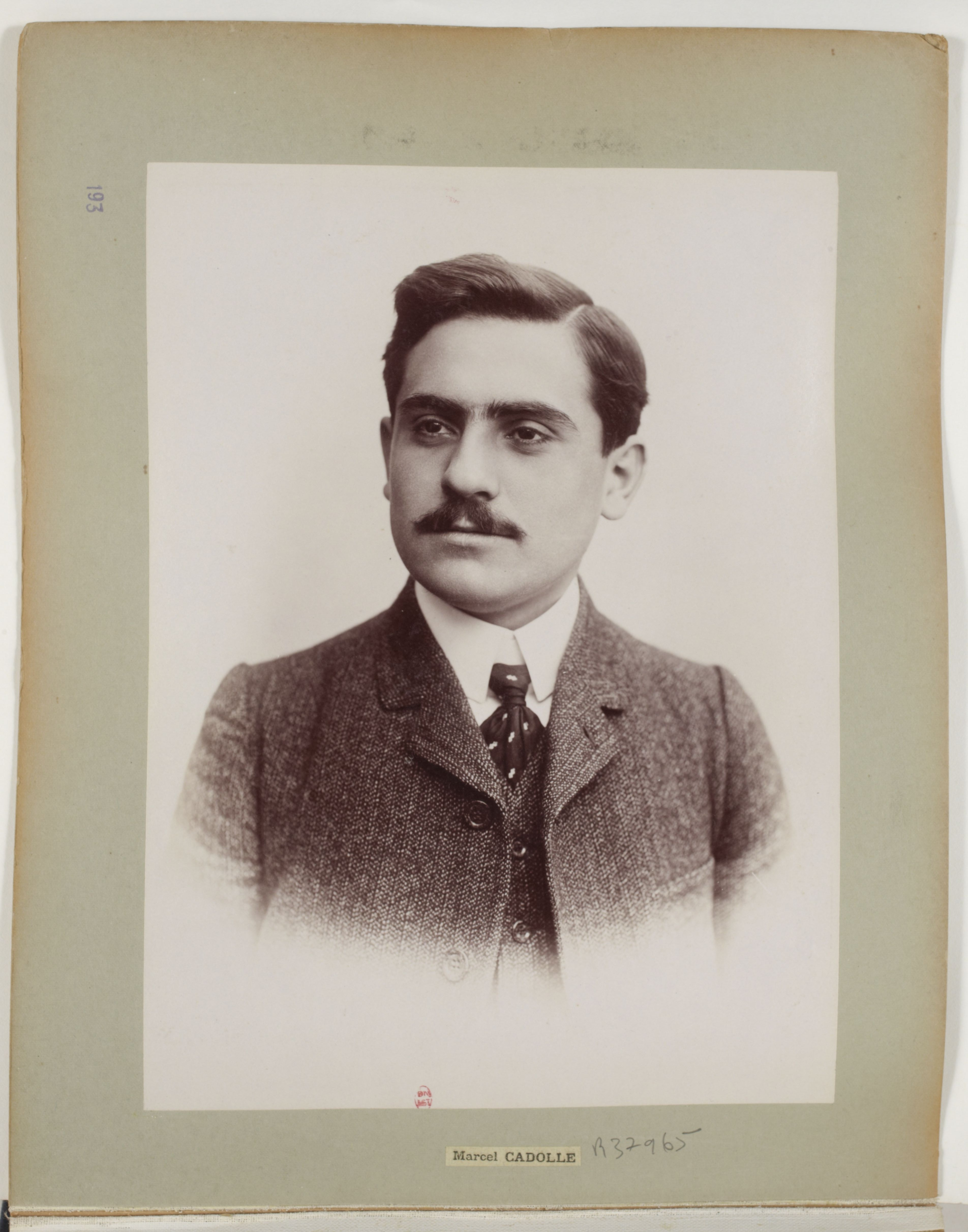 [Collection Jules Beau. Photographie sportive] : T. 21. Année 1903 / Jules Beau : F. 49v. Marcel Cadolle